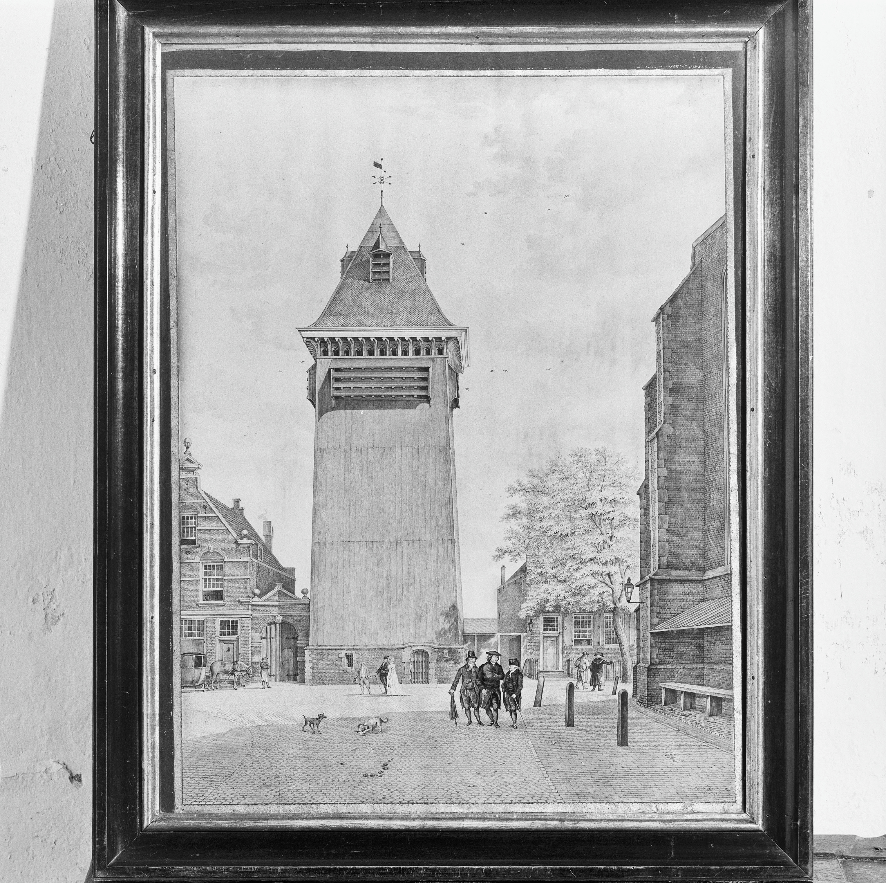 NEDERLANDS HERVORMDE KERK (GROTE OF SINT-BAVOKERK): INT. PRENT VAN HOUTEN KLOKKENTOREN (XVIII)